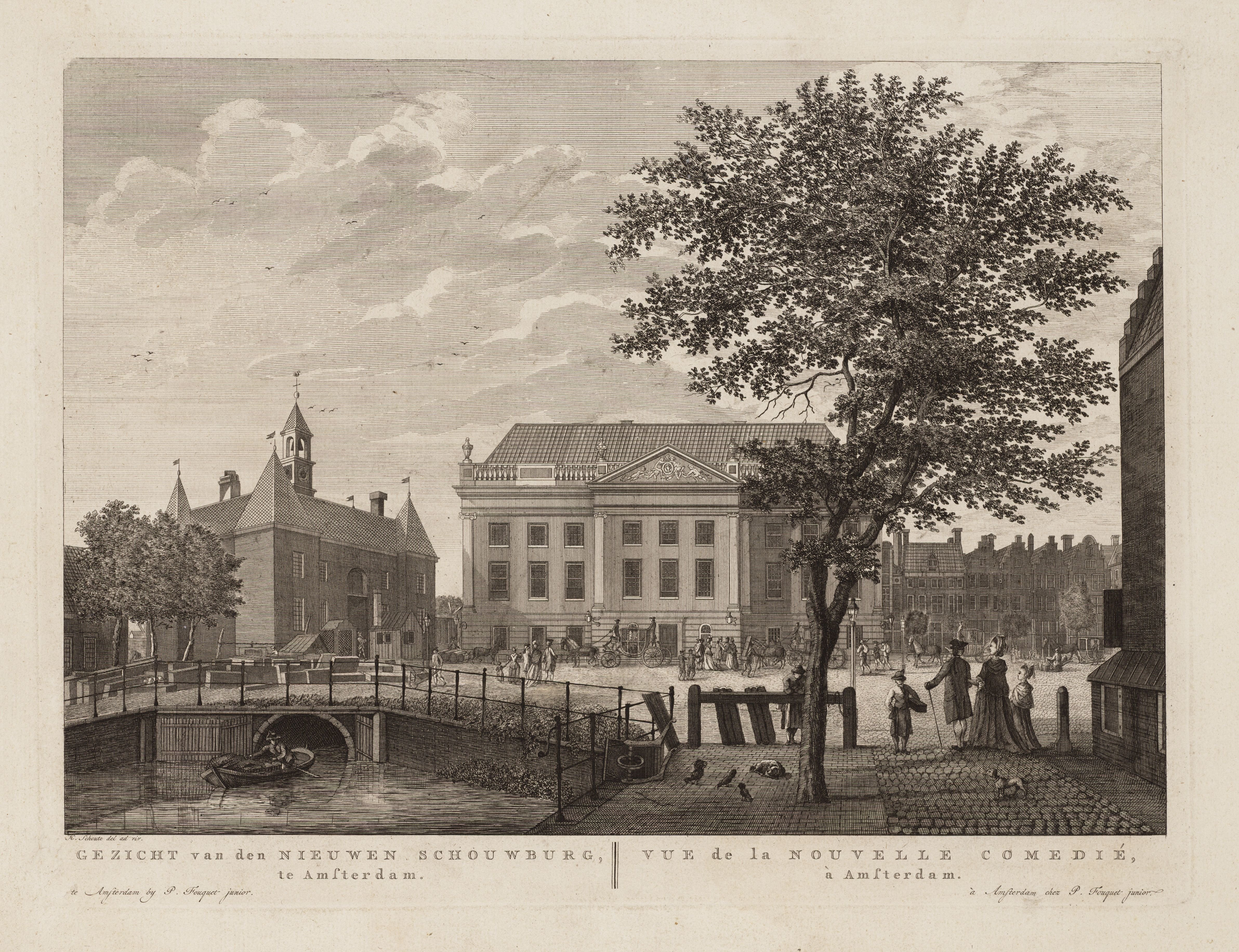 Gezicht op de nieuwe Schouwburg